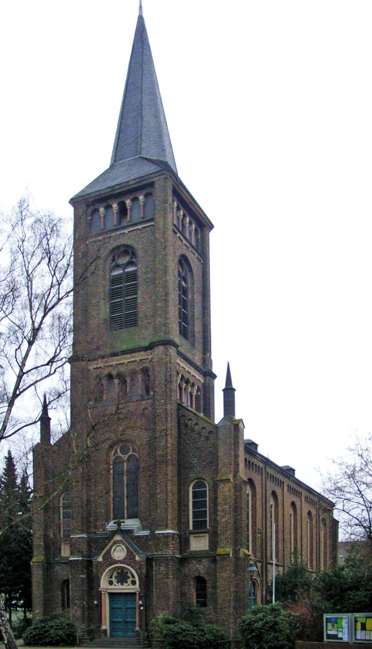 Evangelische Kirche am Bielert, Leverkusen-Opladen. Die Kirche wurde 1876 errichtet.